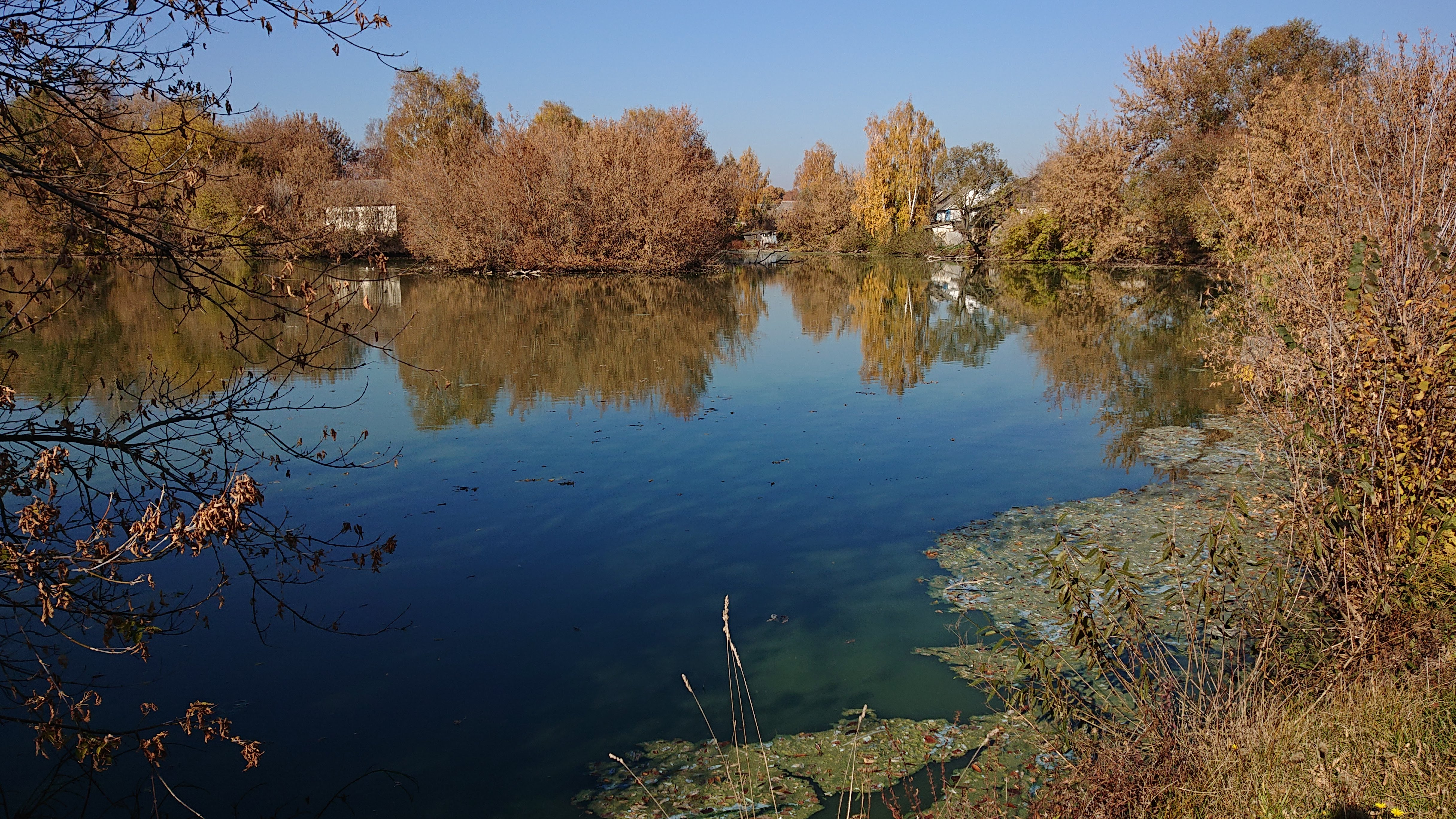 Пруд осенью 2018 года